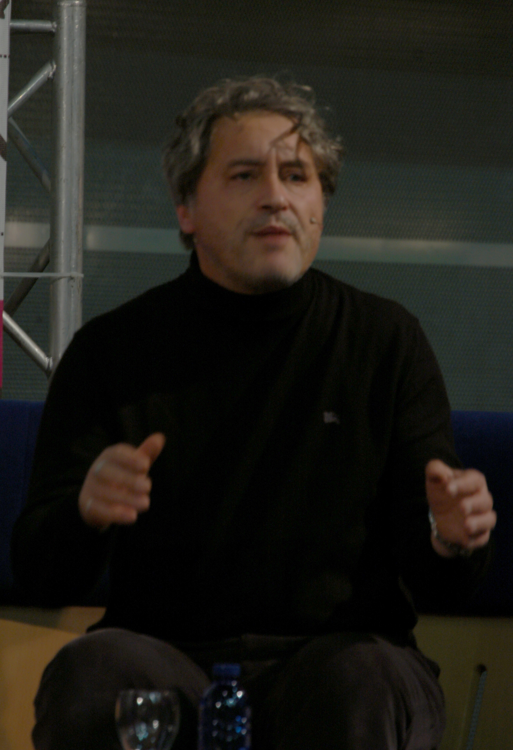 Manuel Rivas en 2010 à Pontevedra en Galice (Espagne)